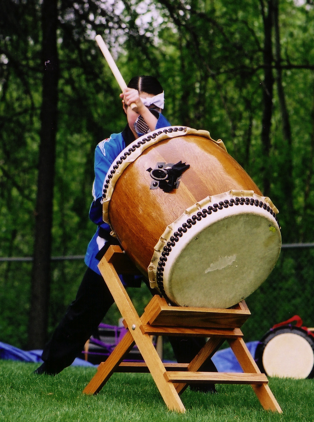 Giant Taiko drum